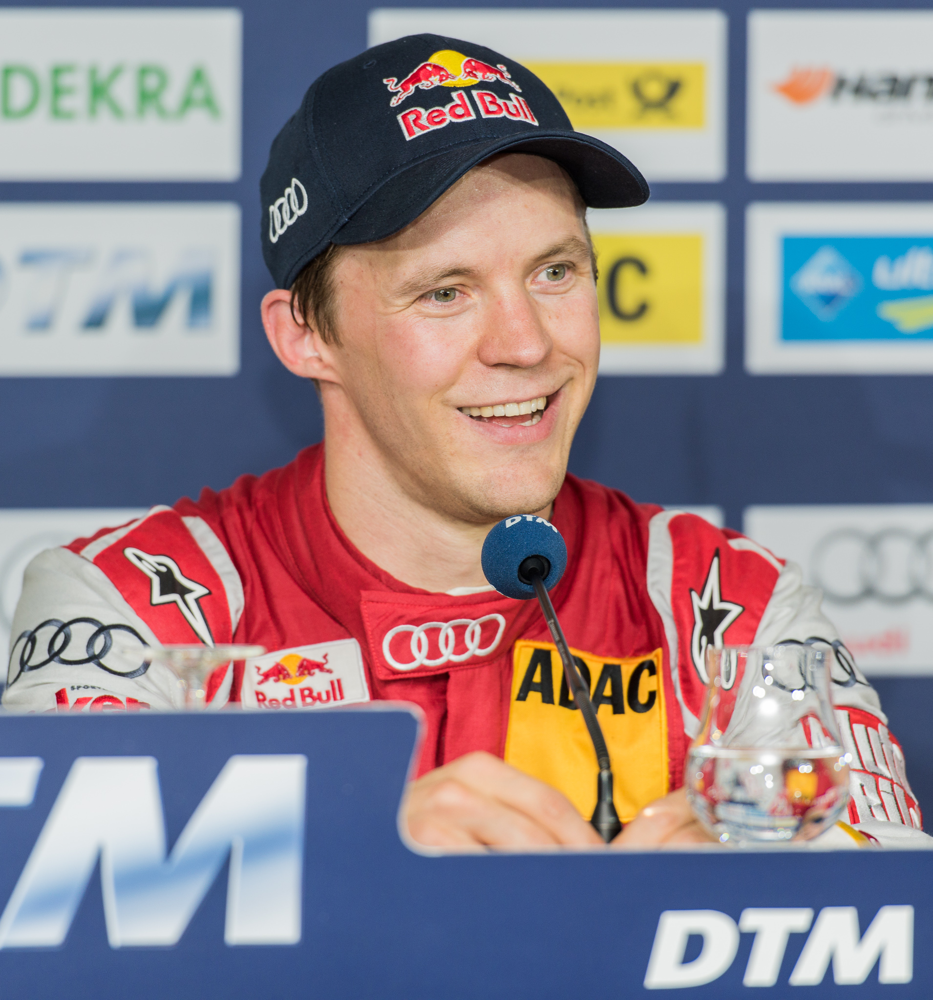 Abt Sportsline GmbH,DTM,Deutsche Tourenwagen Masters,Hockenheimring,Mattias Ekström,Motorsport,Pressekonferenz